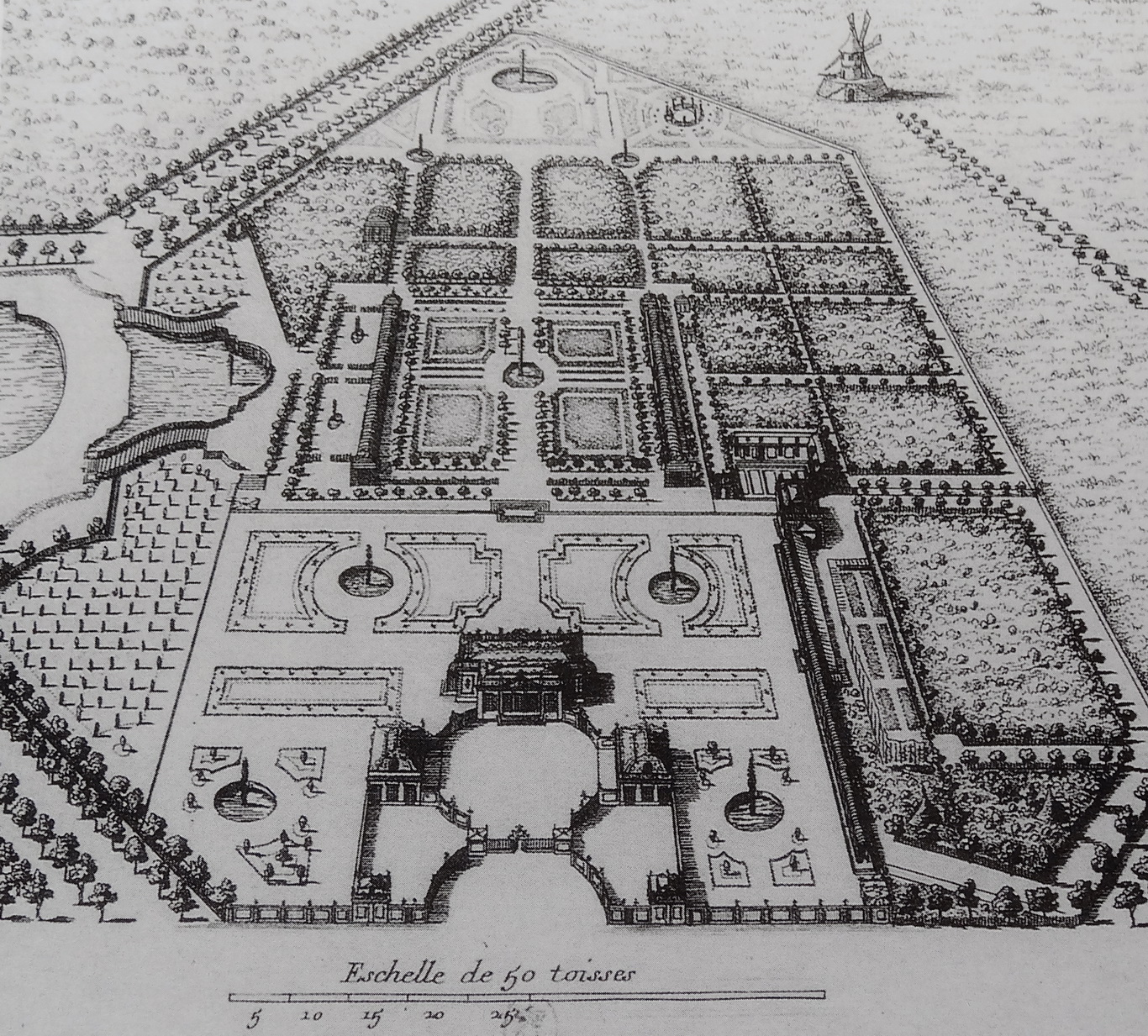 Несколько павильонов построено по периметру круглого двора; сад разделён на две части - Верхний партер (ближе к павильону) и Нижний партер (на оси Большого канала); в северной части - длинная галерея берсо, ведущая к Кабинету ароматов